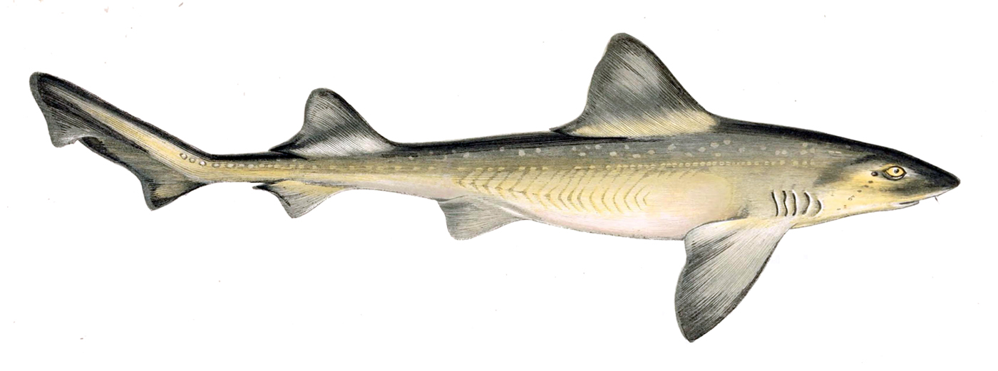 Mustelus mustelus